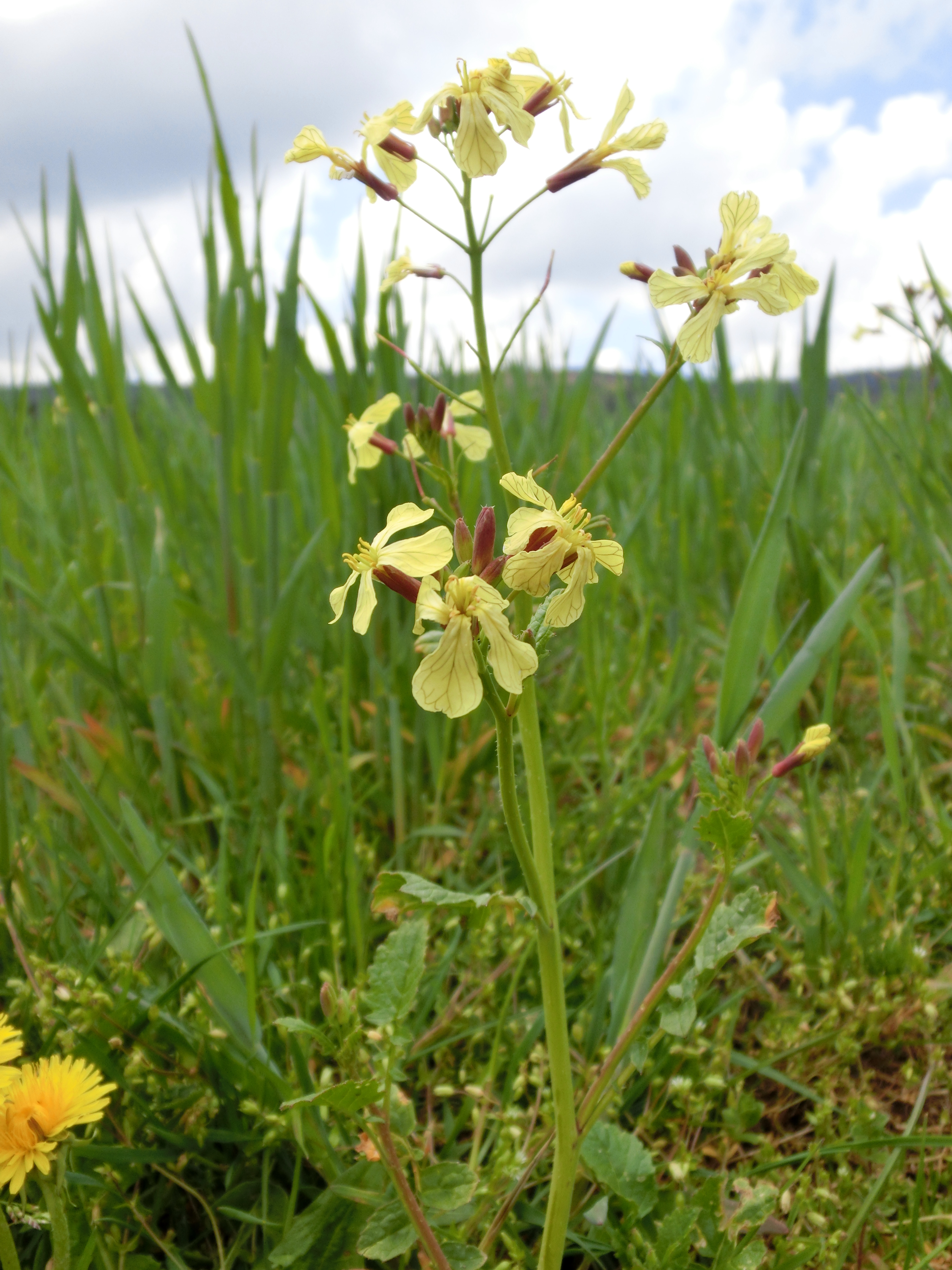 Ravenelle